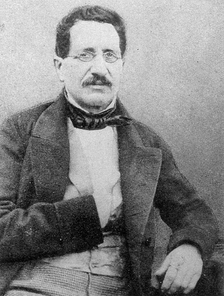 August Reitmayr (1803-1872), Abgeordneter der Paulskirche